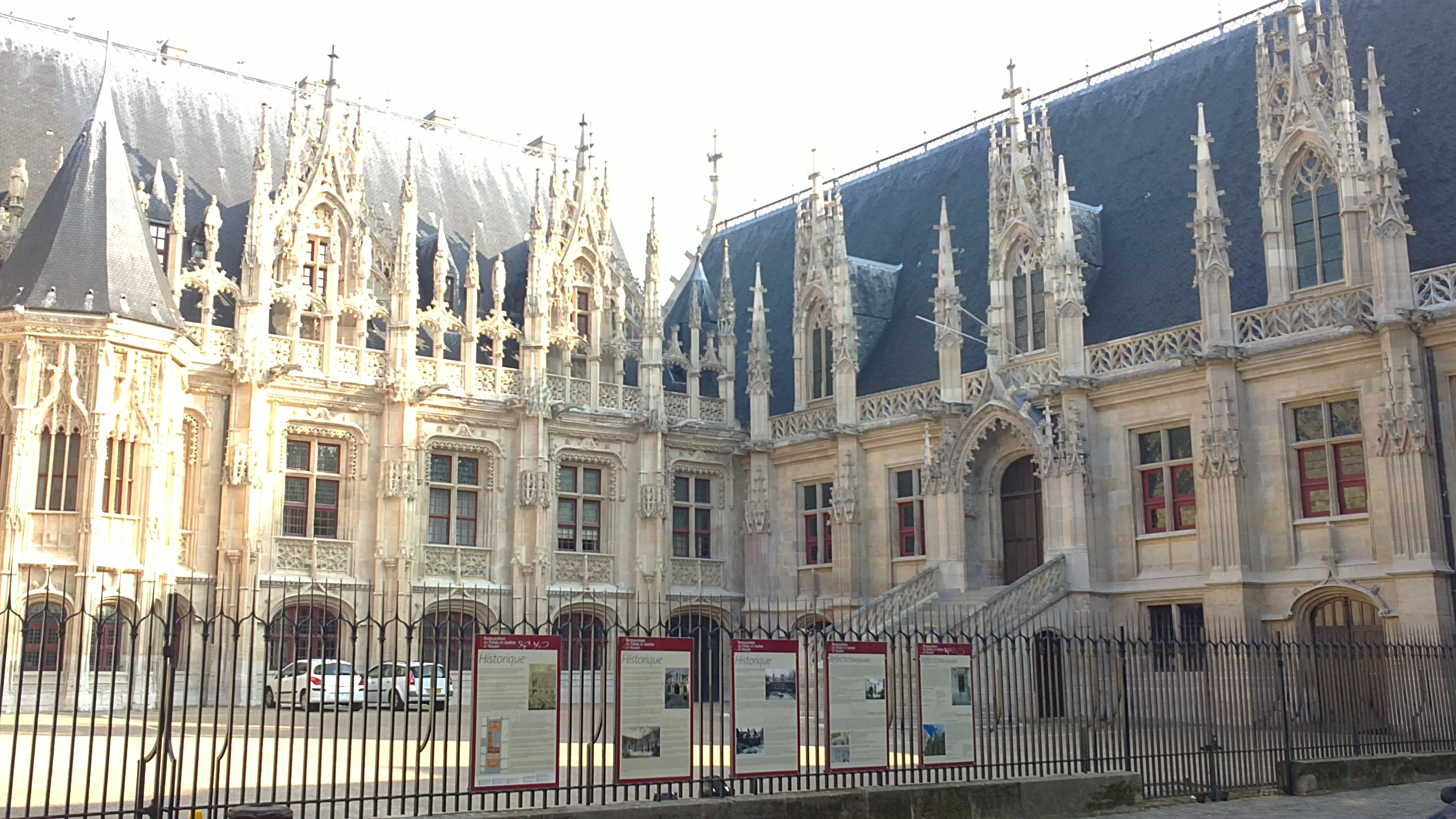 Cour du palais de justice de rouen, côté droit